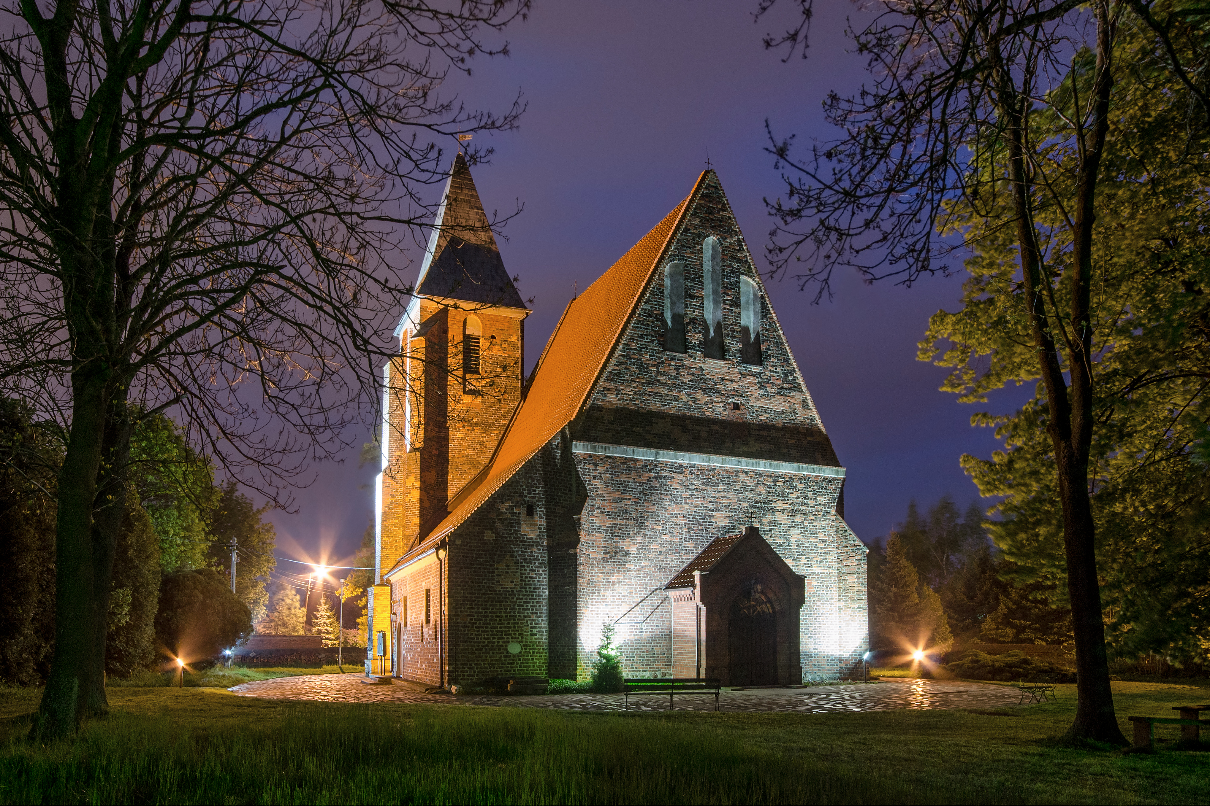 Jaszkotle, kościół obronny p.w. Wniebowstąpienia, 1473, pocz. XVI, 1725, 1891